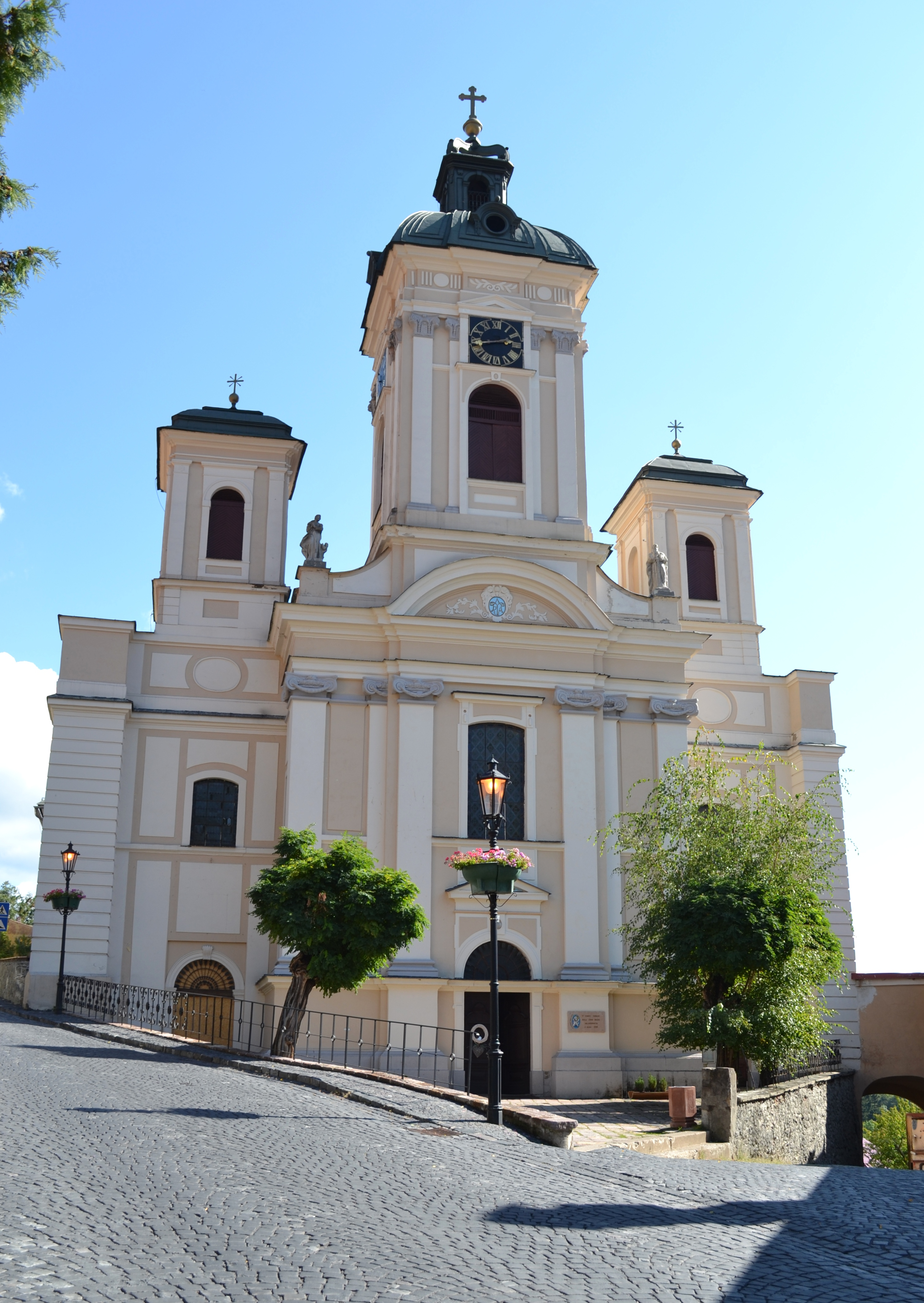 Kostol Nanebovzatia Panny Márie v Banskej Štiavnici